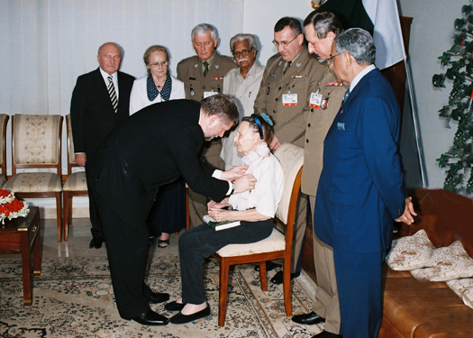 Odznaczenie Zofii Turowicz Medalem Złotego Krzyża Wojska Polskiego Pani Zofii Turowicz przez Podsekretarza Stanu MON Pana Marka Zająkała w Konsulacie Generalnym RP w Karaczi.